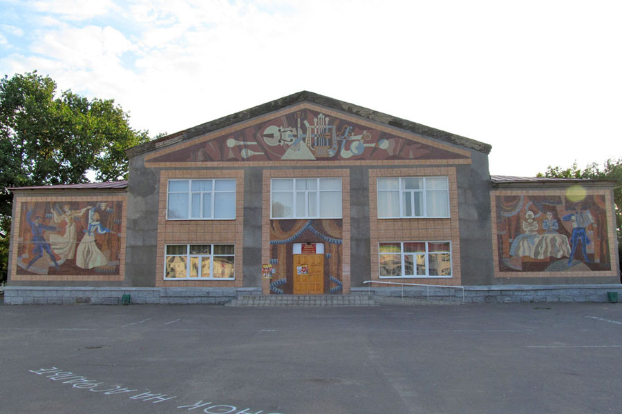 Дом культуры в пгт. Новониколаевский (Волгоградская область)